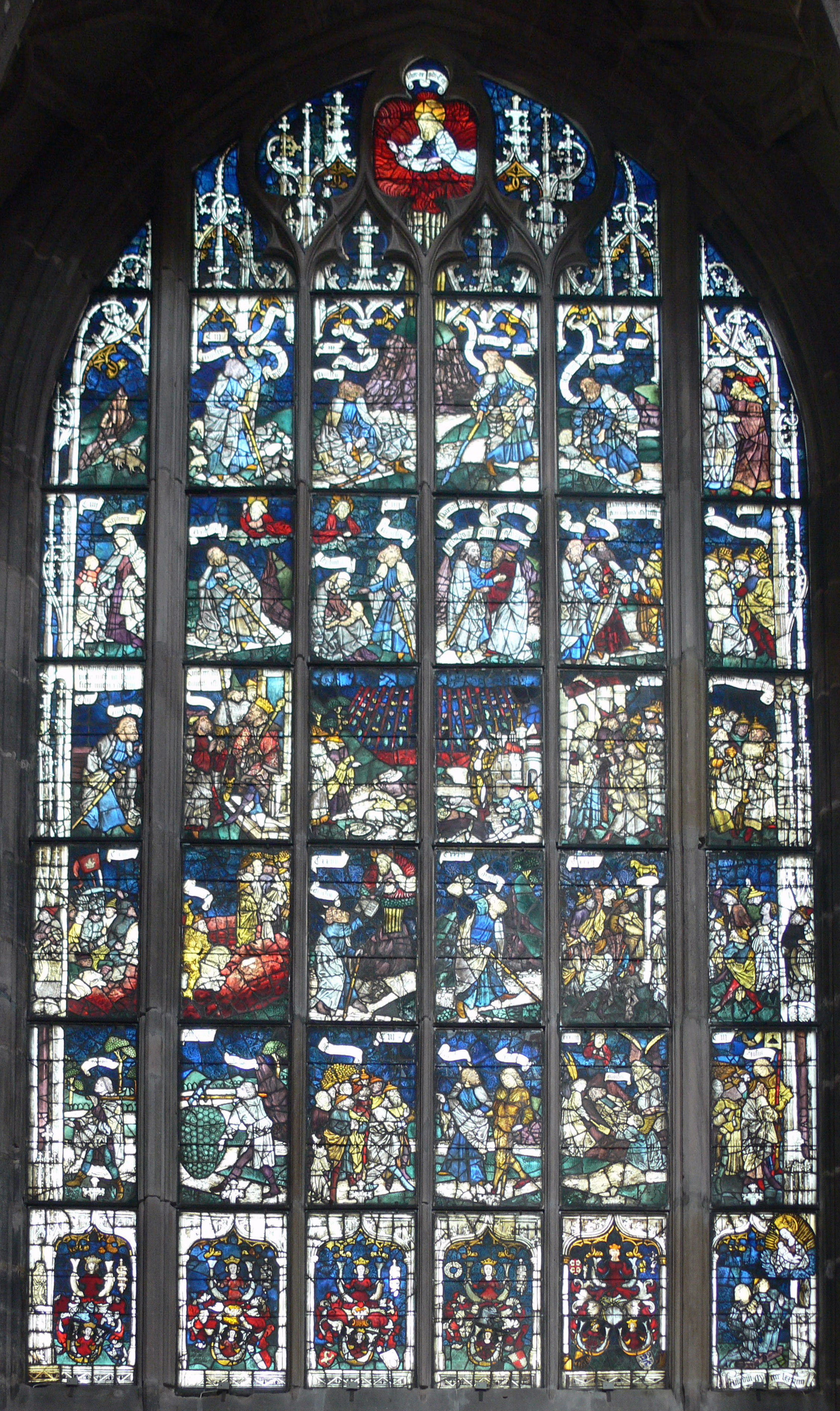 Intérieur de l'église Saint-Lorentz, Nuremberg (Allemagne)